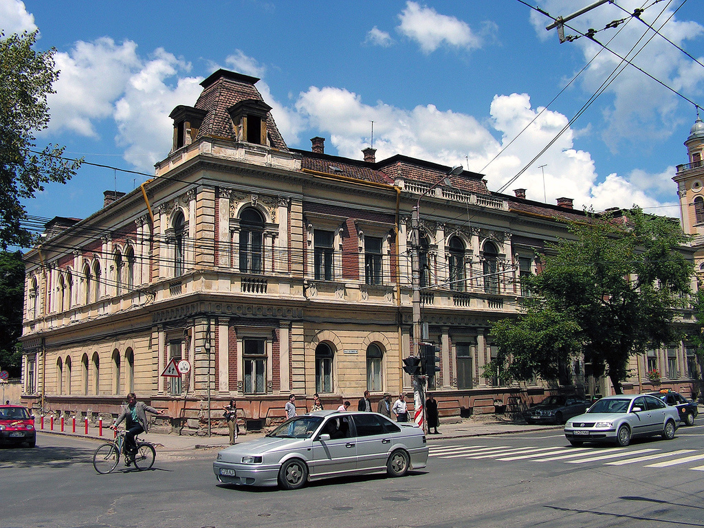 Kolozsvár, a Magyar utca 37. (1989. december 21. út) bal oldalán, a kétágú templom előtti épület